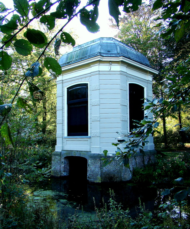 Leeuwenlaan 40 ´s Graveland